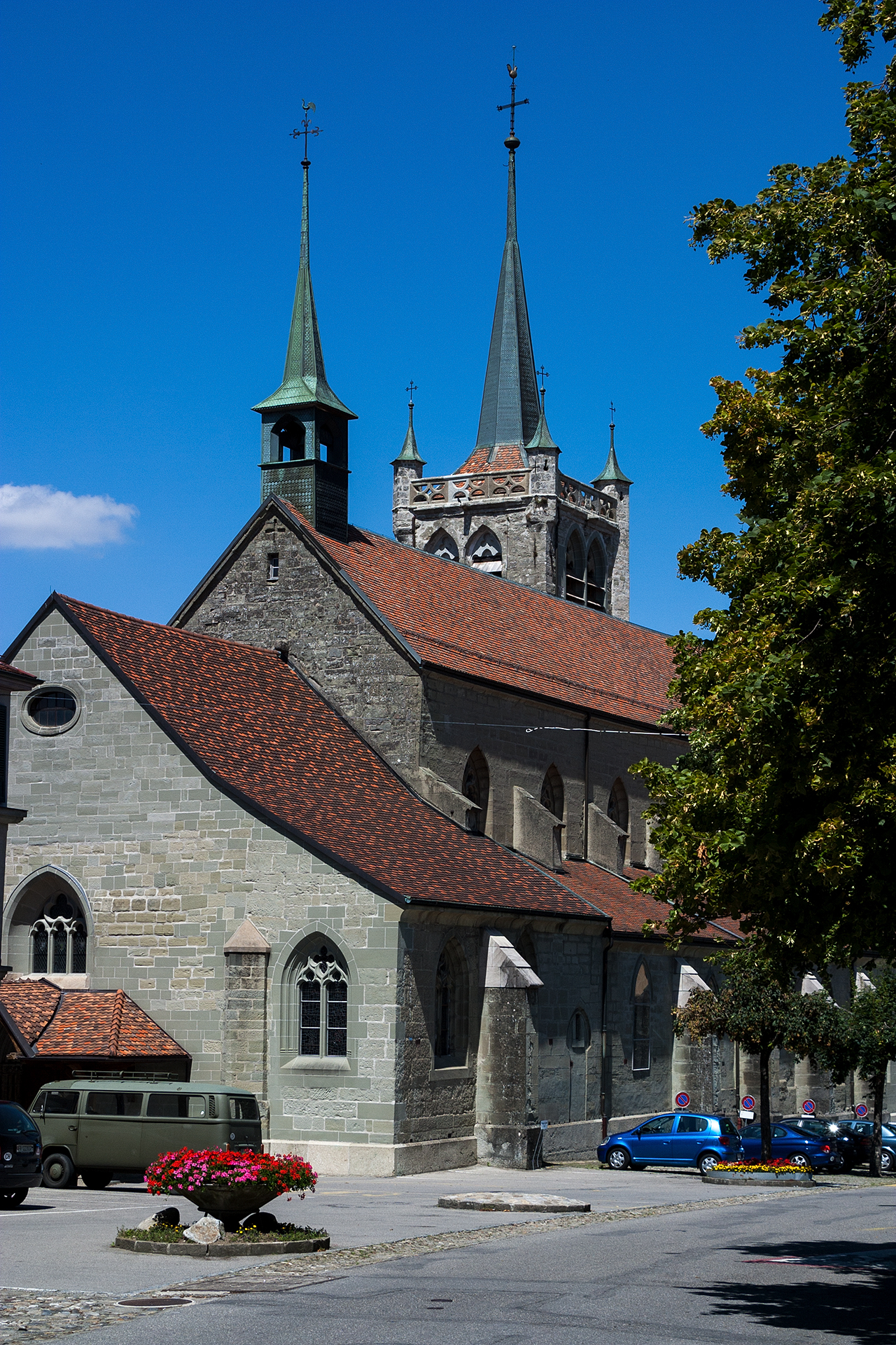 Kollegiatskirche von Romont (FR)